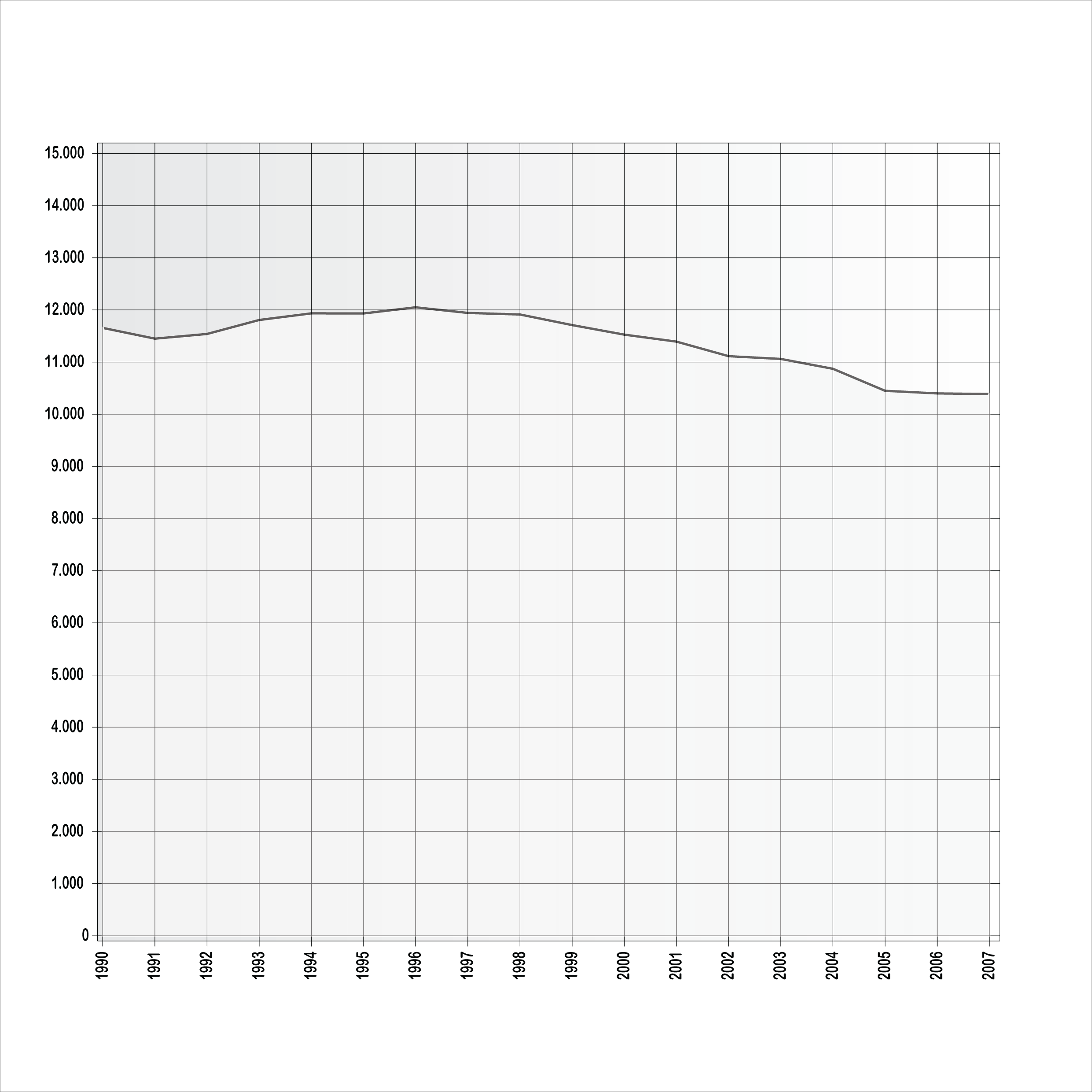 Einwohnerentwicklung_Ueckermünde_1990_-_2007